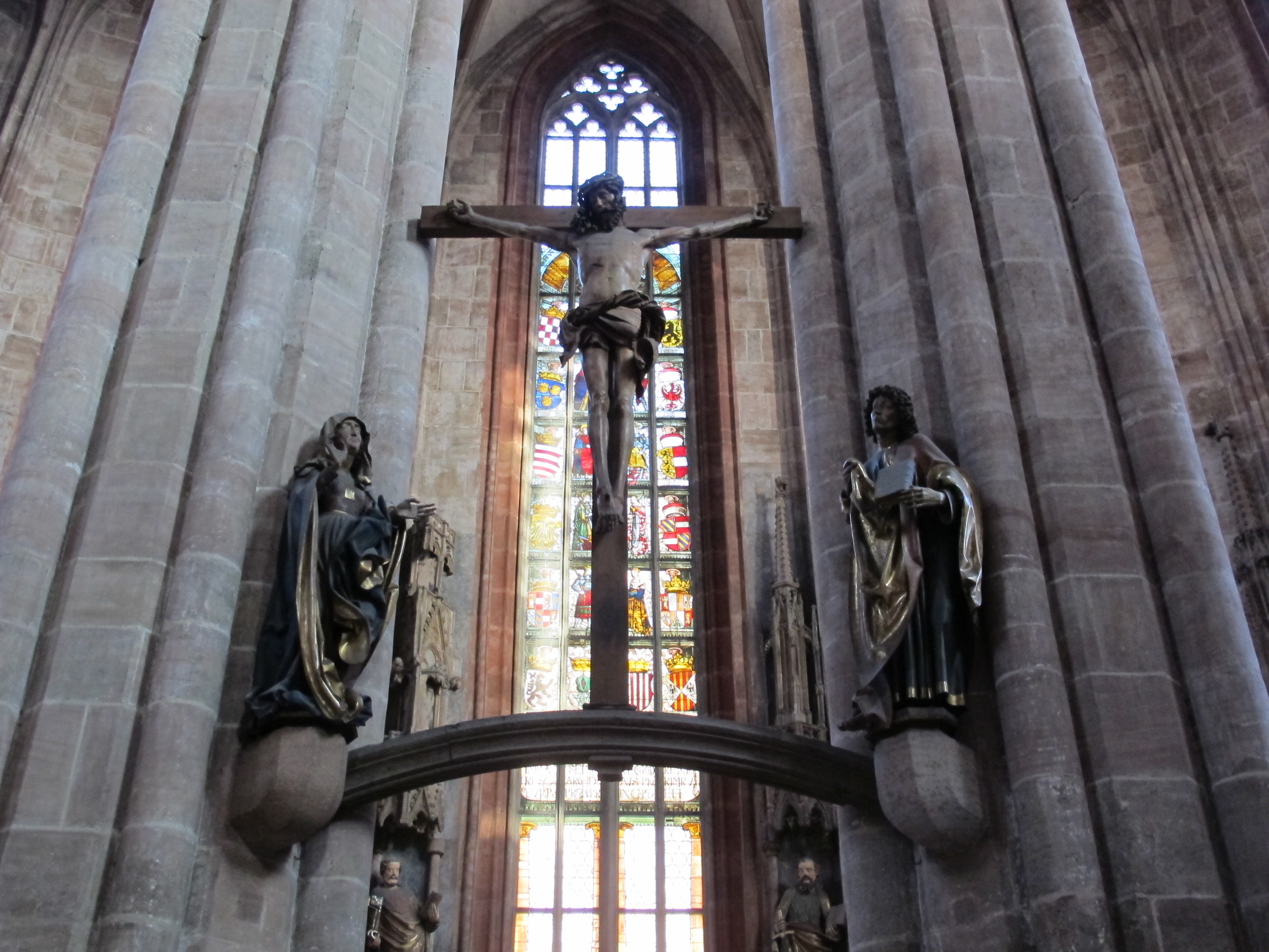 Croce coi dolenti di veit stoss, 1520 circa